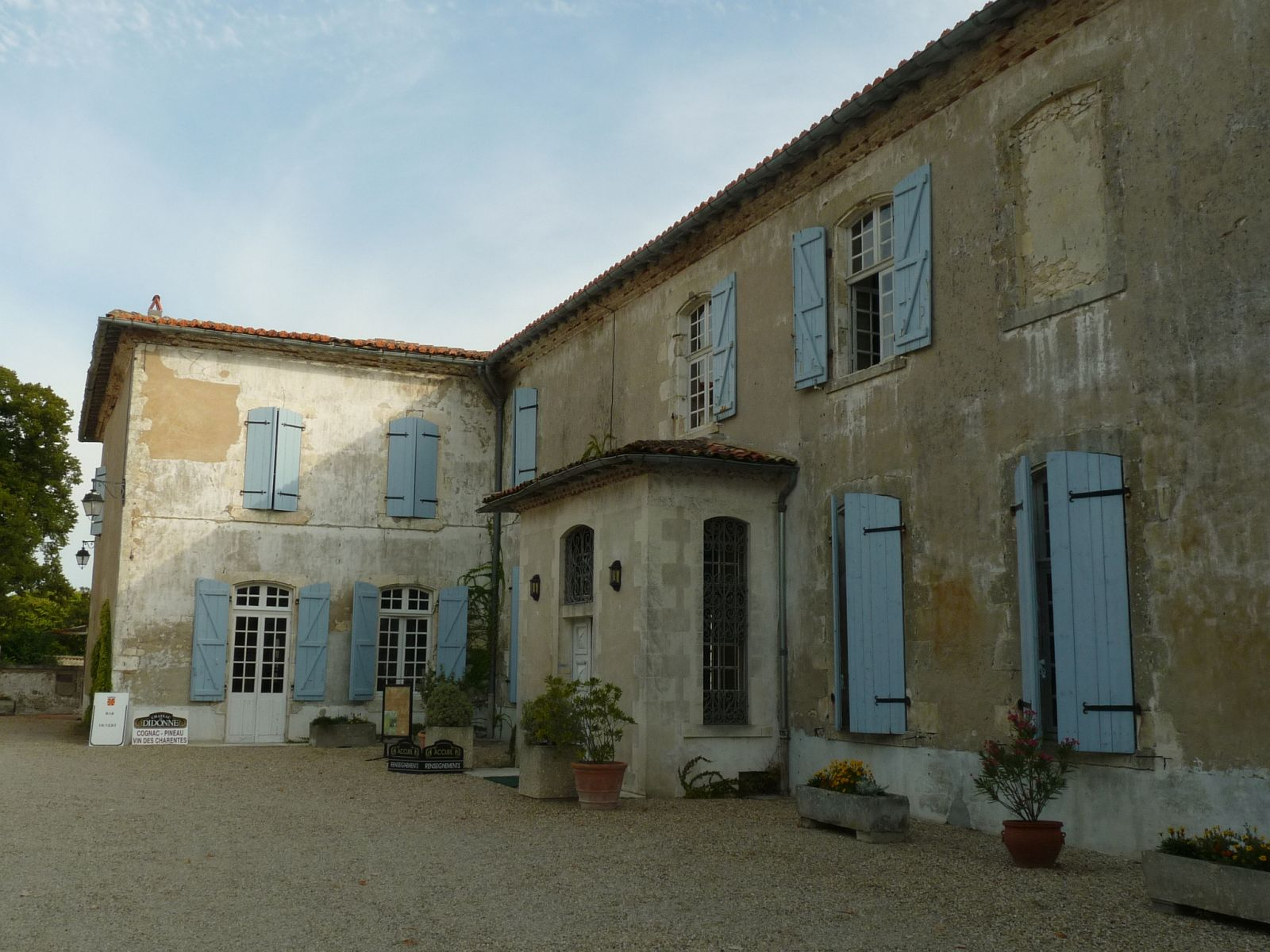 Château de Didonne à Sémussac (17), France